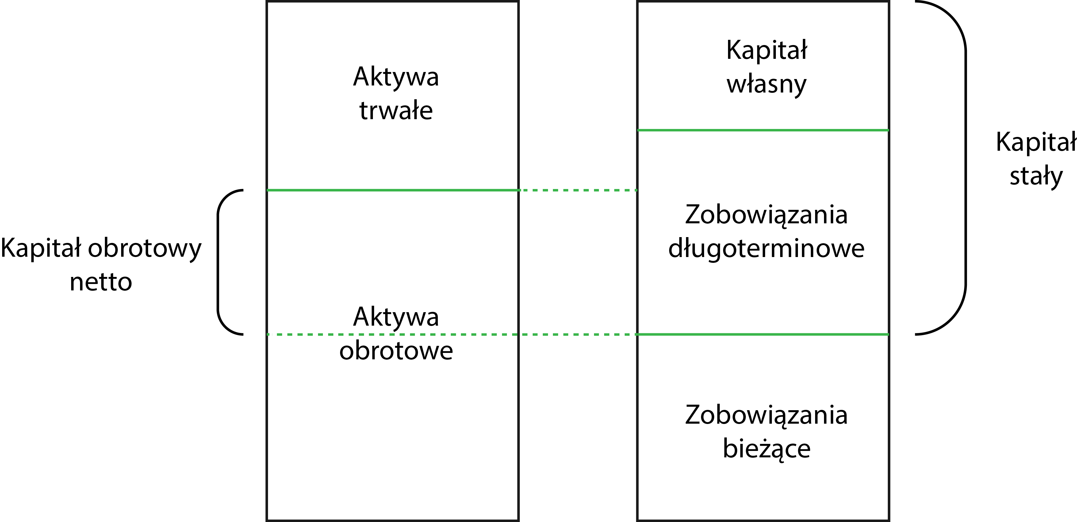 Pojęcie kapitału obrotowego